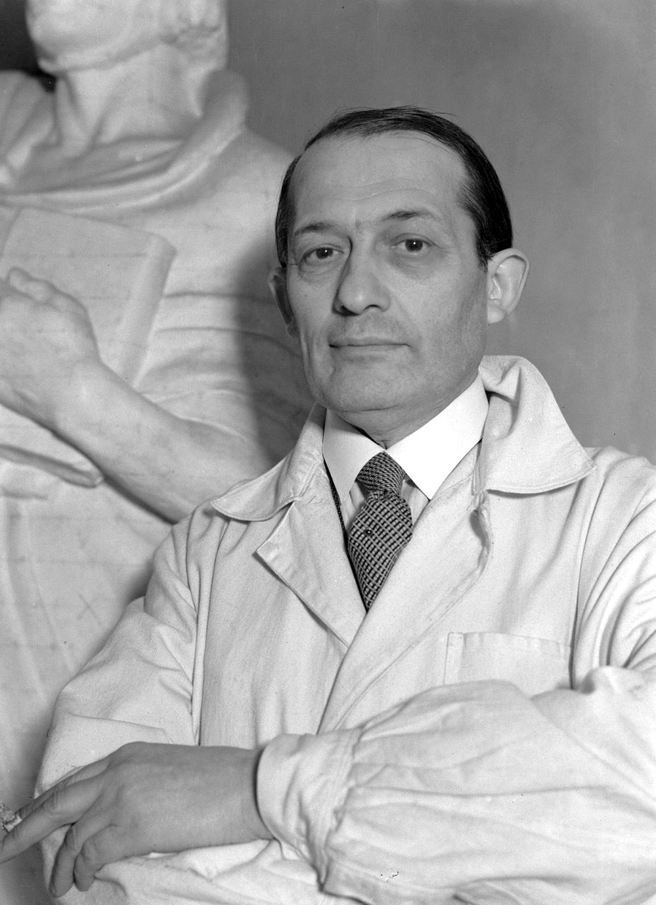 De beeldhouwer Henryk (Henri) Kuna bij een van zijn beelden in het altelier